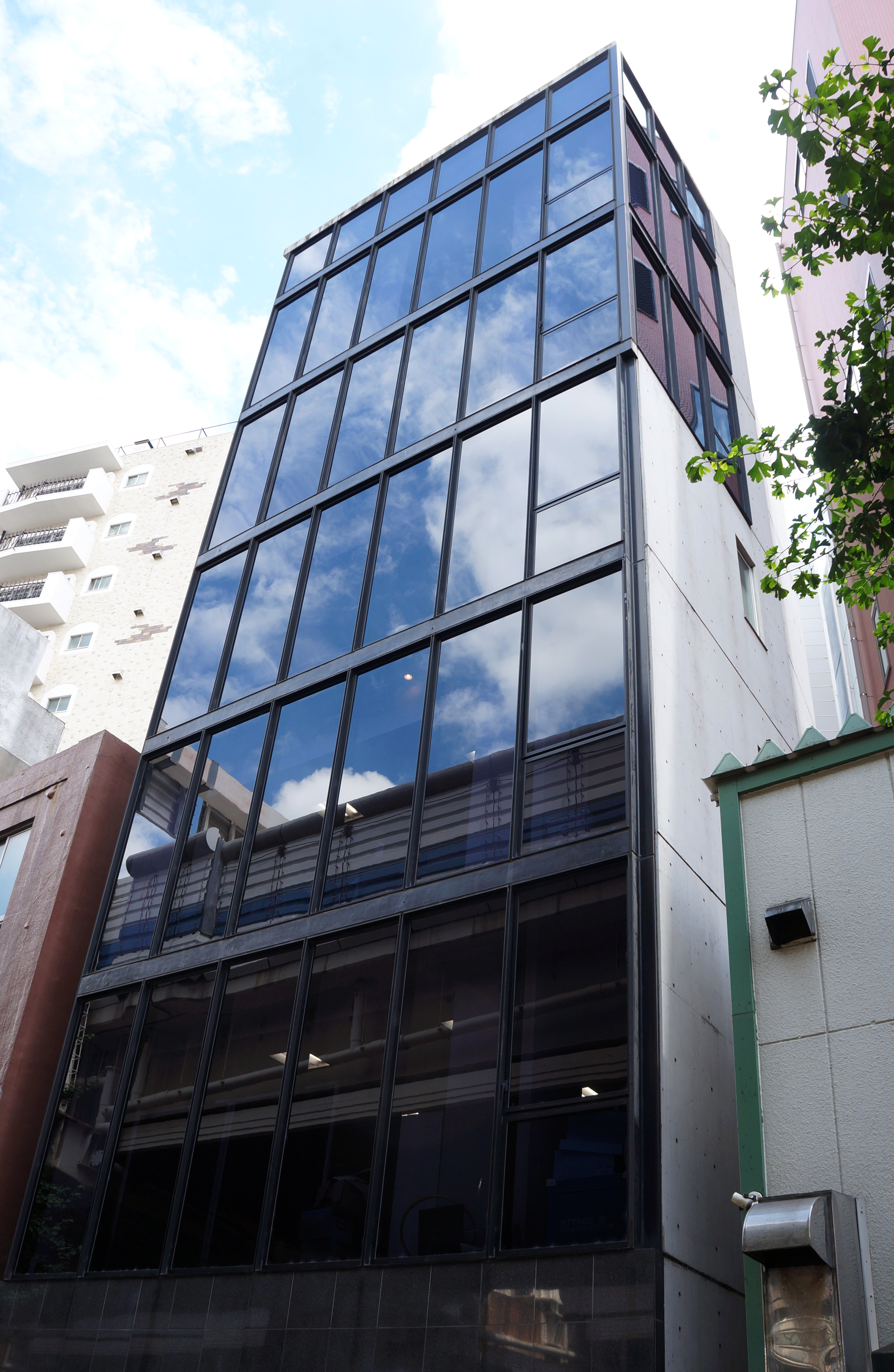 池尻オフィスが入居しているクレストビル